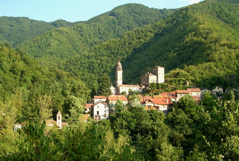 Foto propria Agosto 2008 Valbrevenna (Genova) - Veduta di Senarega